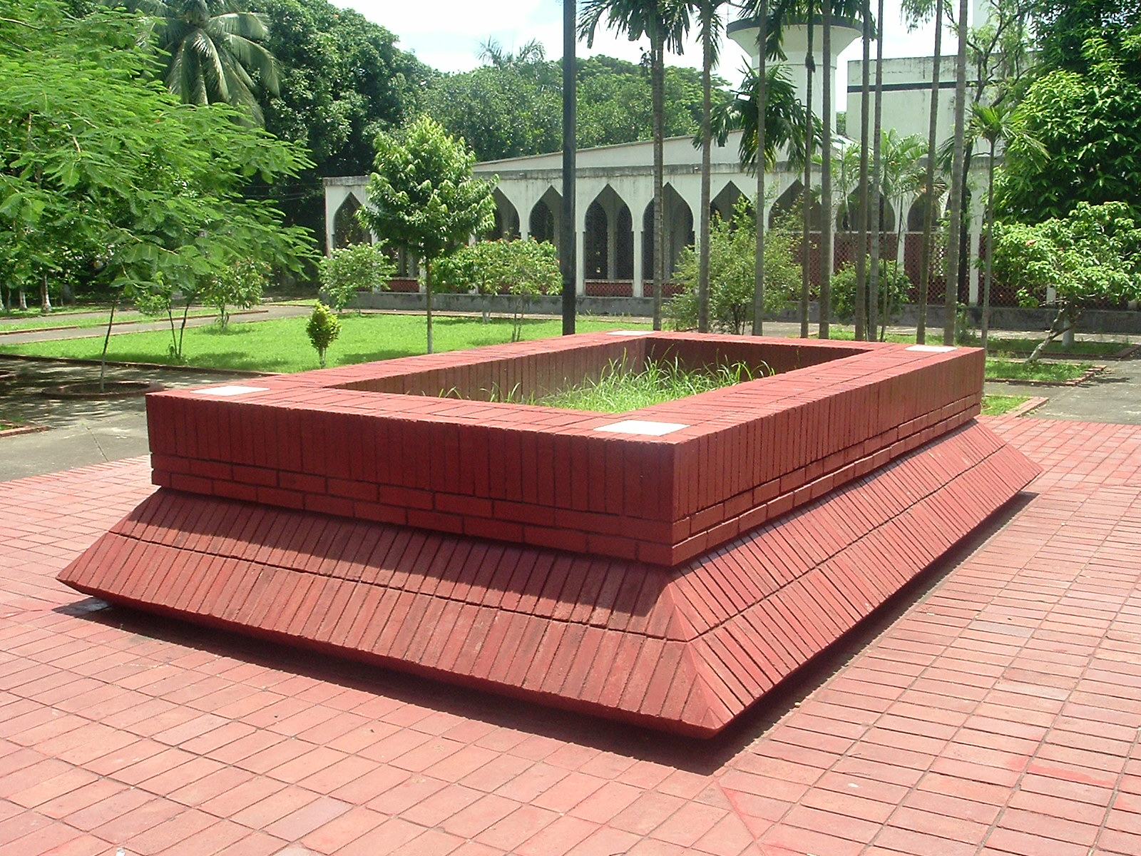 Tomb of Nazrul Islam, DU, Dhaka.